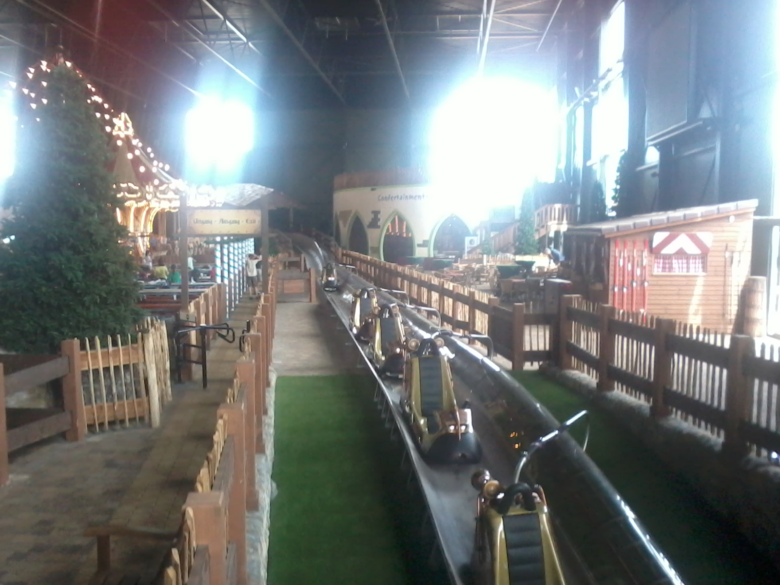 De voertuigen (bobkarts) van de attractie Maximus' Blitz Bahn in Attractiepark Toverland.